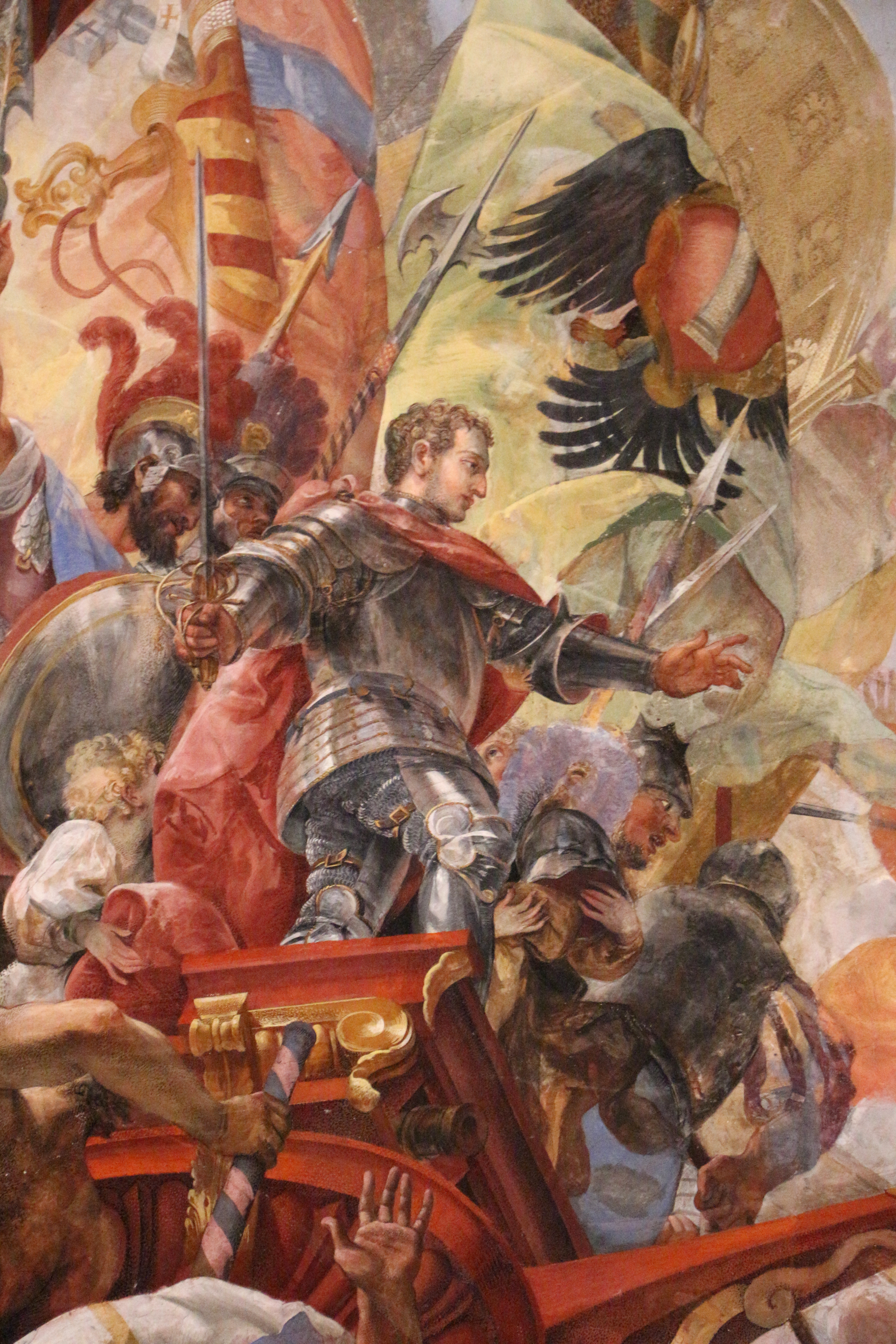 Giovanni Coli e Filippo Gherardi, storie della battaglia di lepanto, 1675-78, 05.JPG